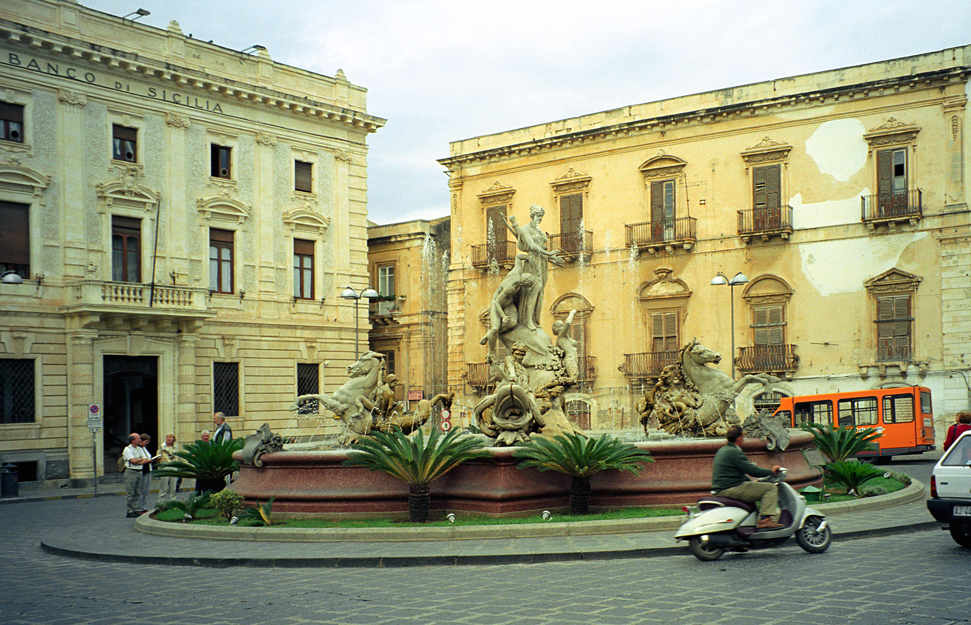 Piazza Archimede con la Fontana di Diana a Siracusa.